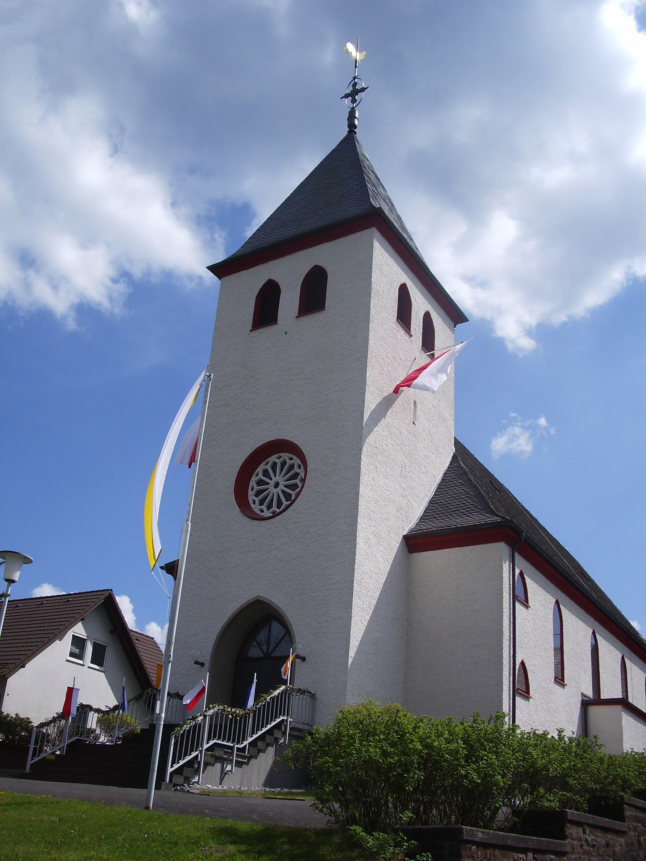 Katholische Kirche St. Johannes Evangelist in Gernsdorf, Ansicht von Nordwesten 2014